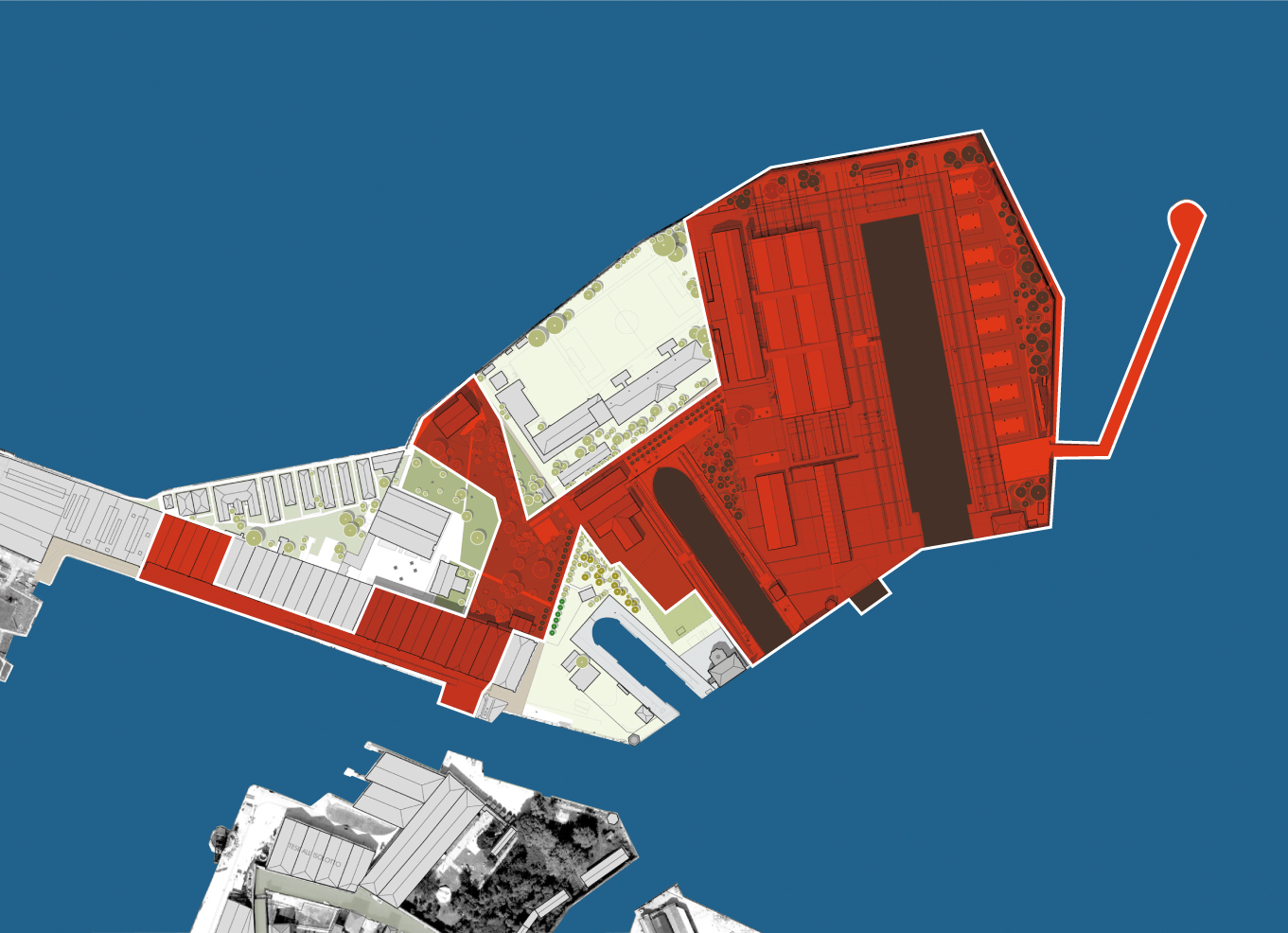 Foto Arsenale Nord